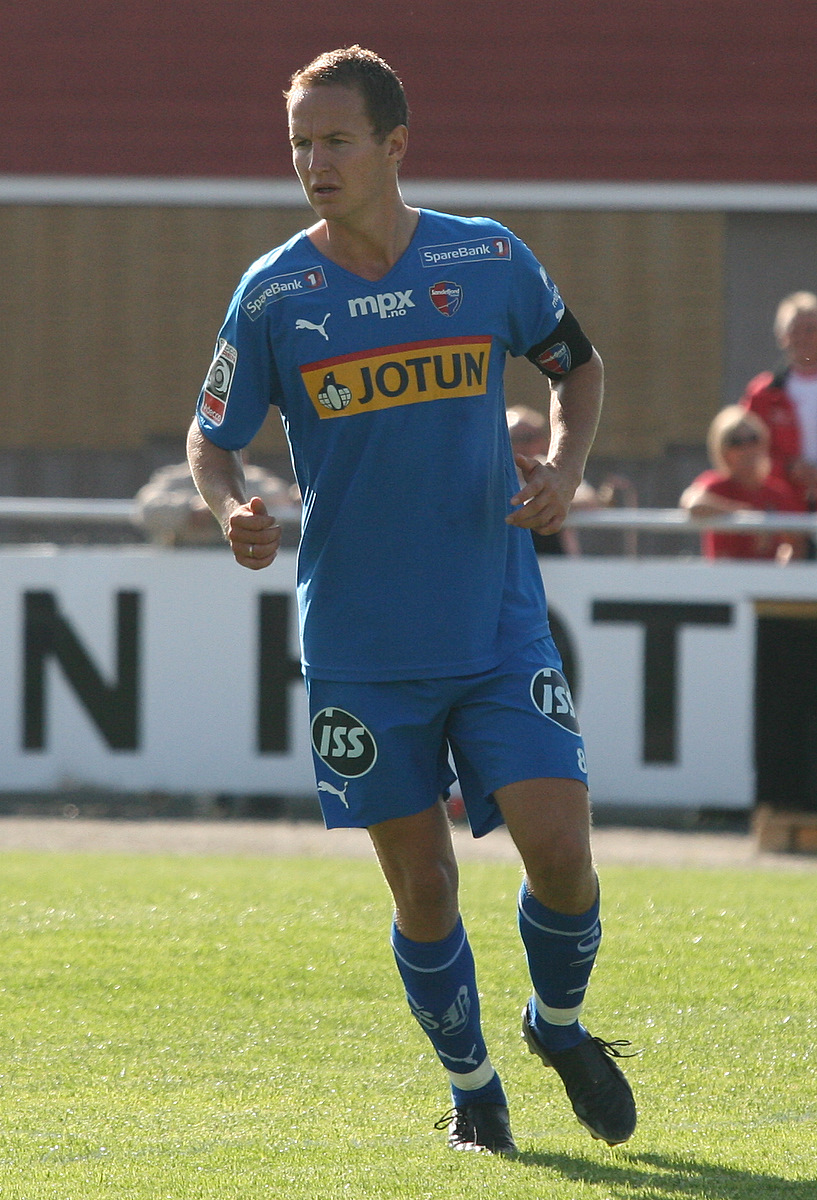 Espen Nystuen, Sandefjord